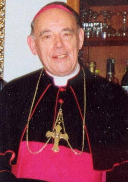 Van Lierde